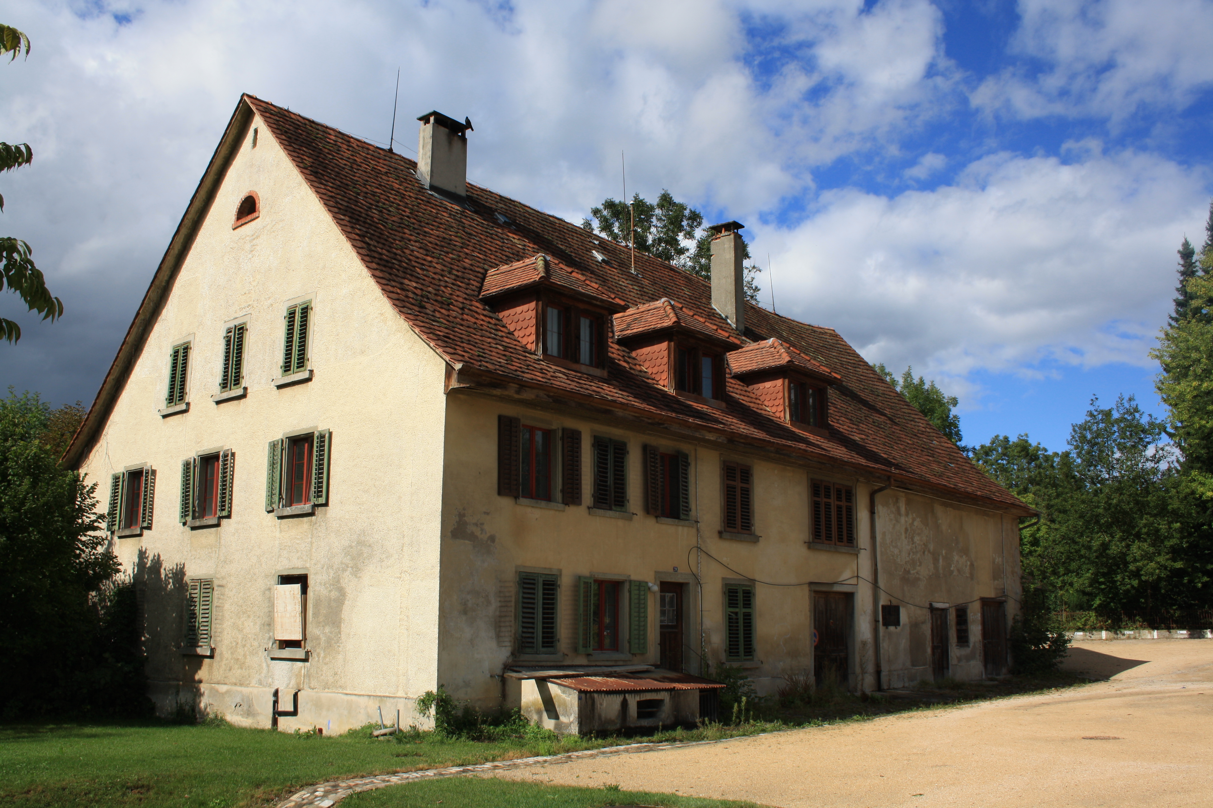 Klosterhalbinsel